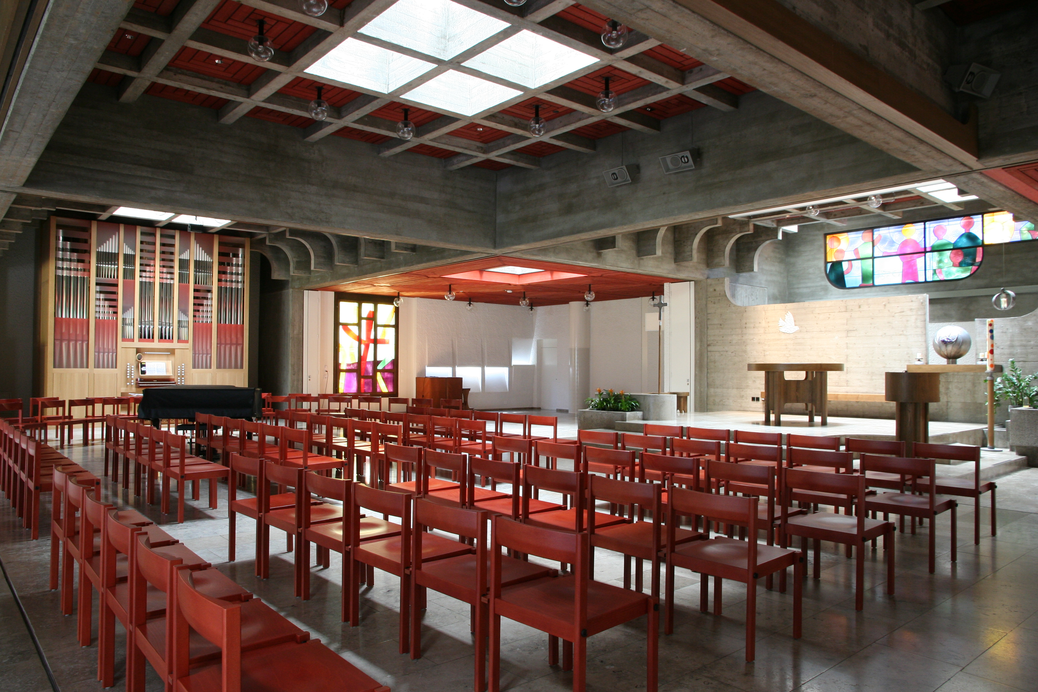 röm.-kath. Kirche St. Urban Winterthur-Seen